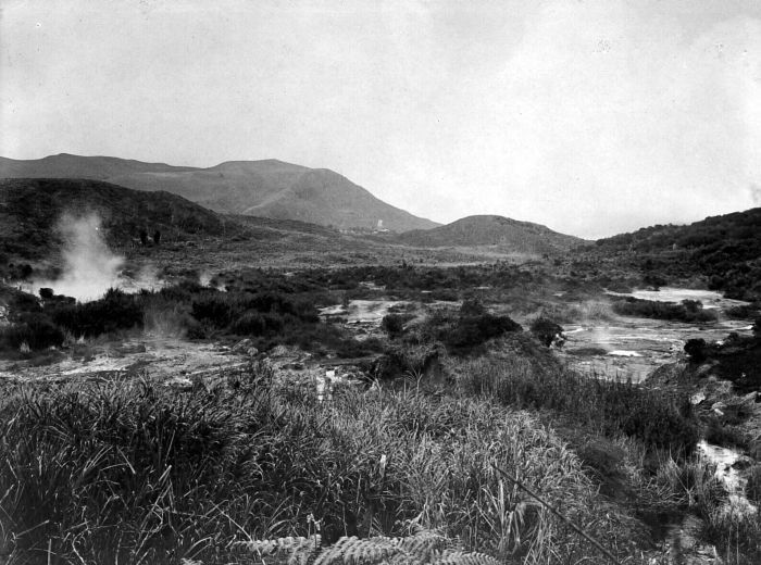 Repronegatief. Telaga Leri, een vallei met beken en warme bronnen in het Diengplateau in Kedoe, Midden-Java